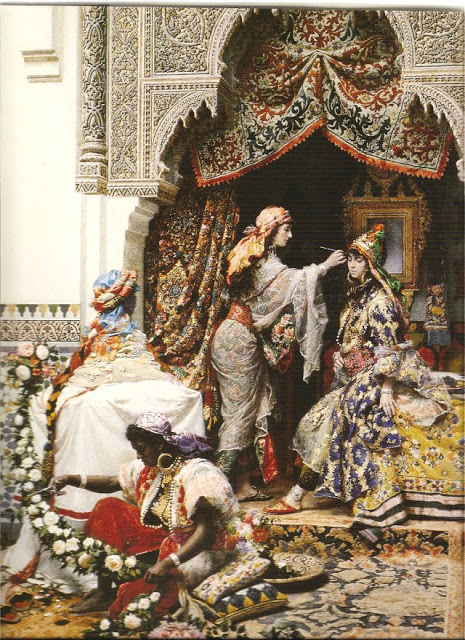 Obra de Josep Tapiró i Baró, etapa a Tànger.